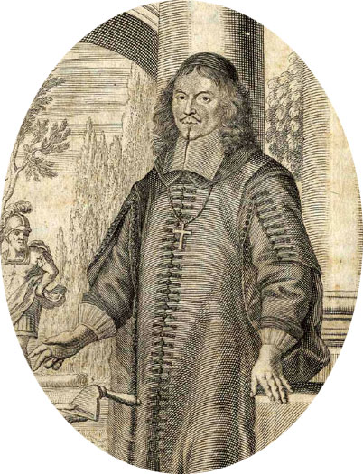 Potrait des Salzburger Fürsterzbischofs Max Gandolf von Kuenburg